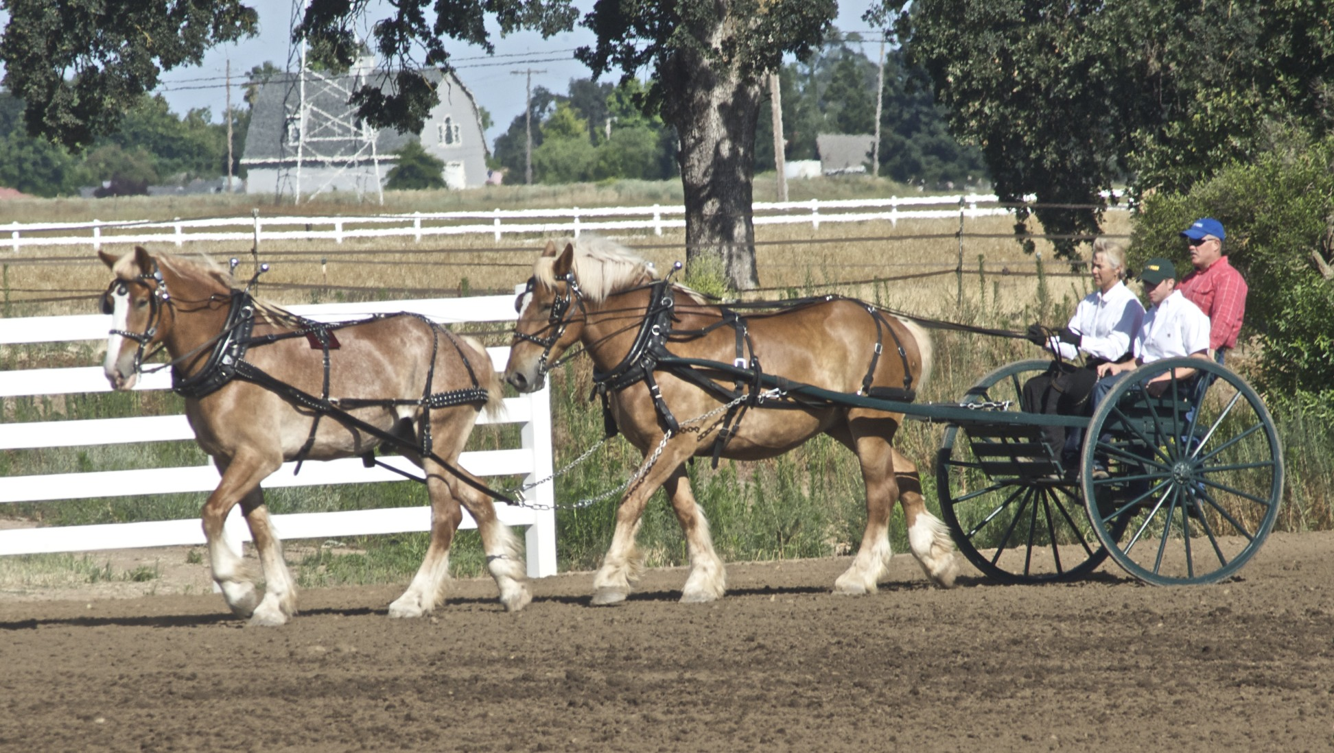 Belgian draft horses